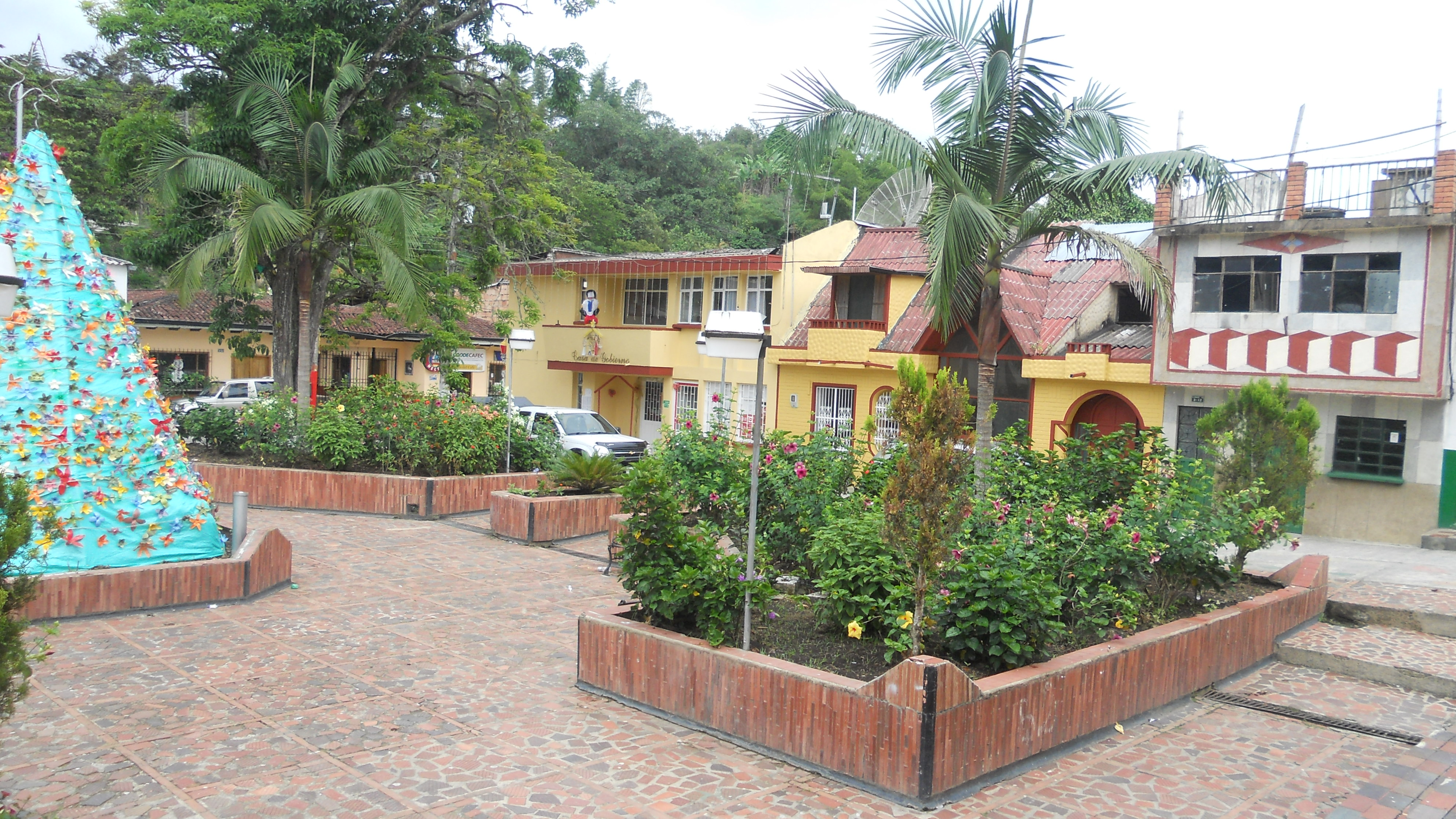 casco urbano